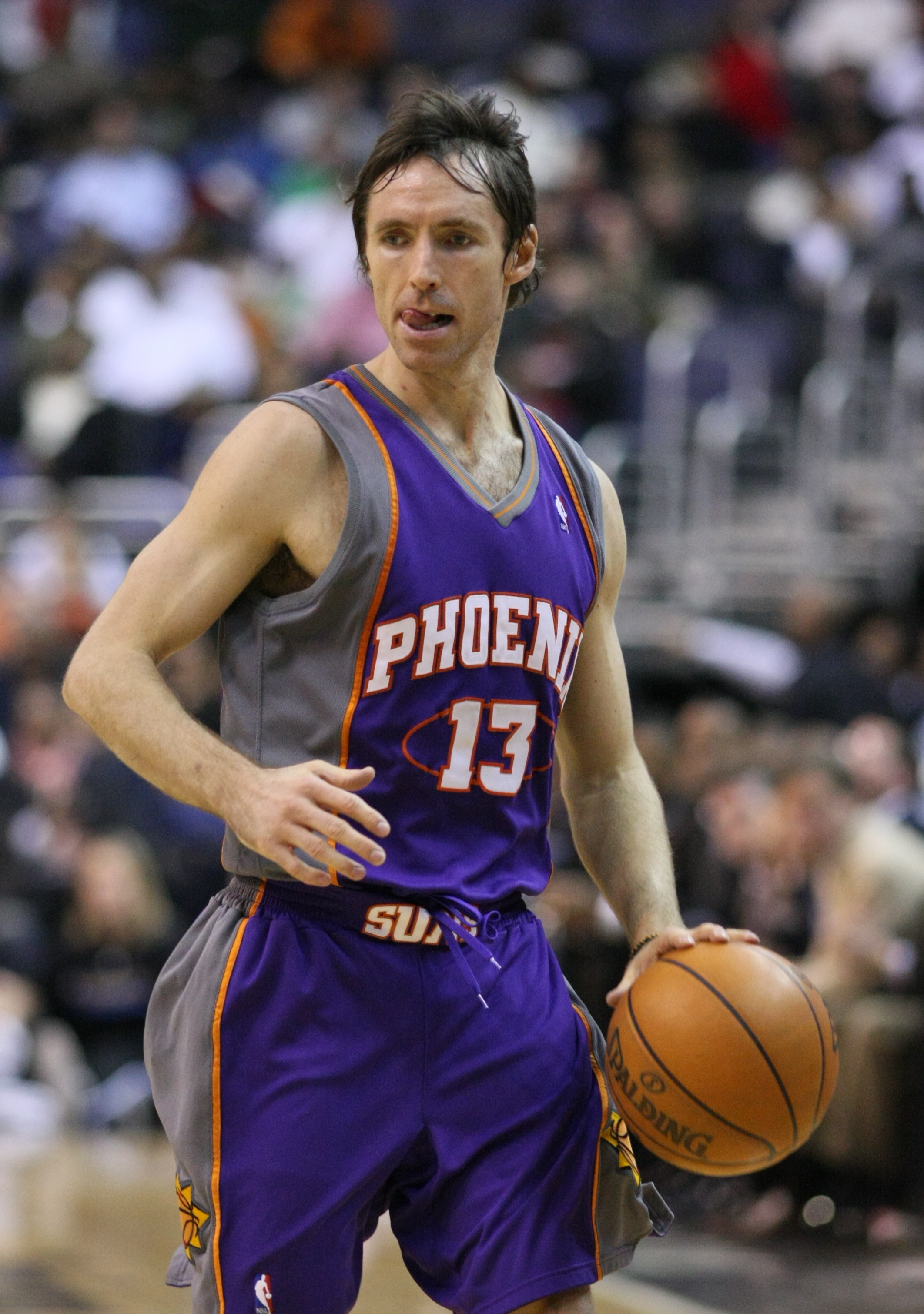 El jugador canadiense de baloncesto Steve Nash.